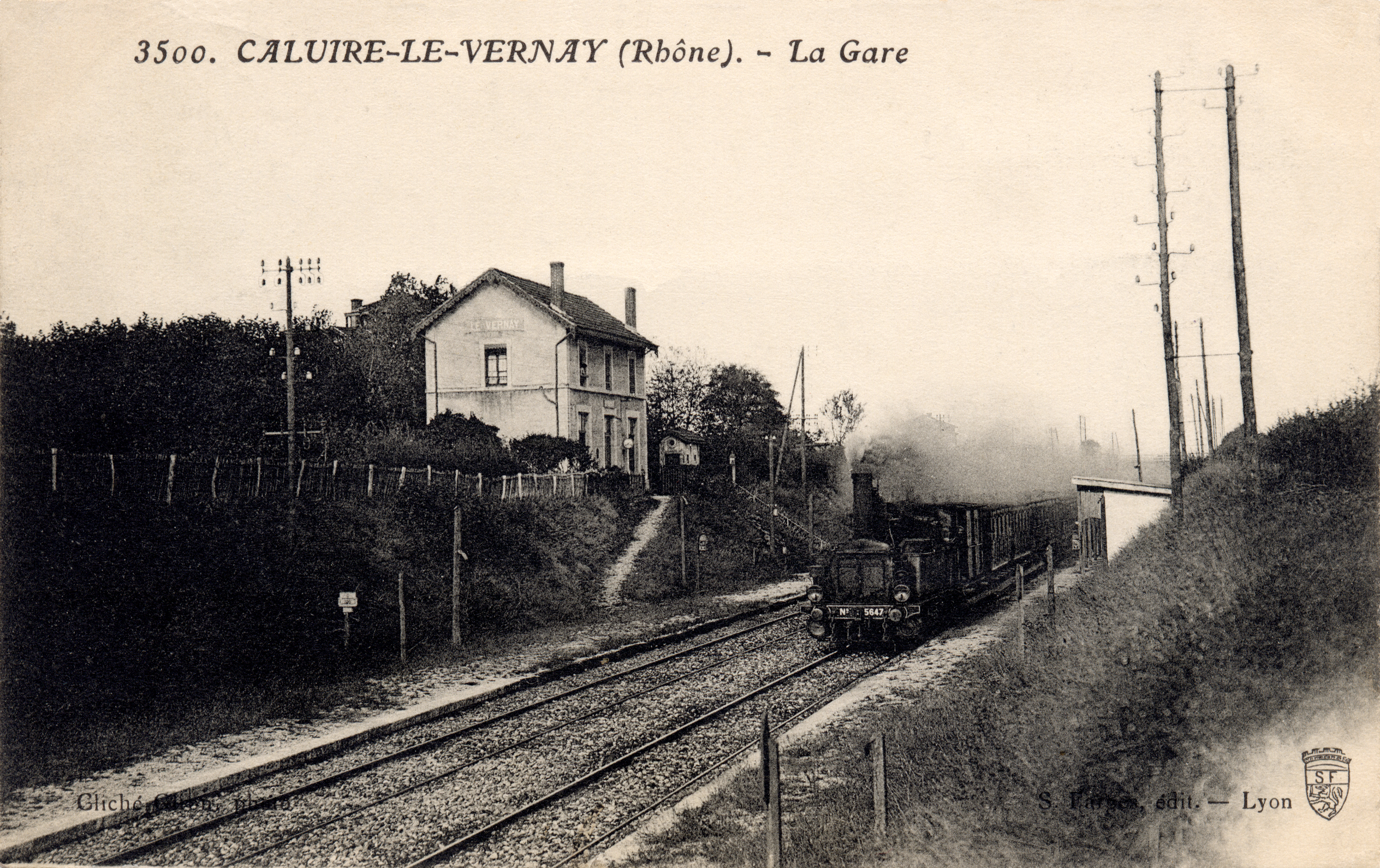 Gare du Vernay à Caluire-et-Cuire en 1913.